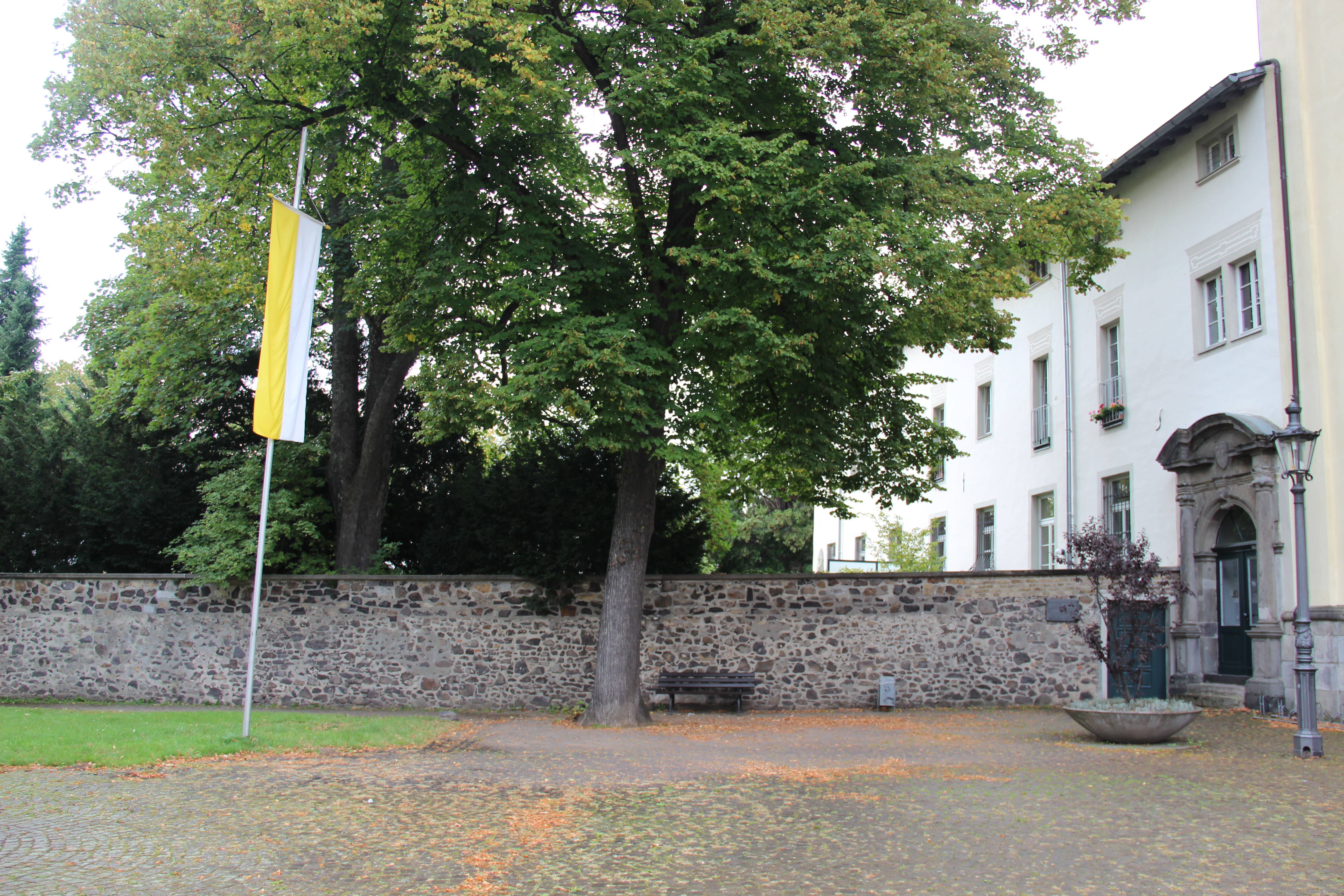 Ehemalige Klosteranlage „Karmel Sankt Joseph“, Karmeliterstraße 1/1d/1e, Bonn-Pützchen